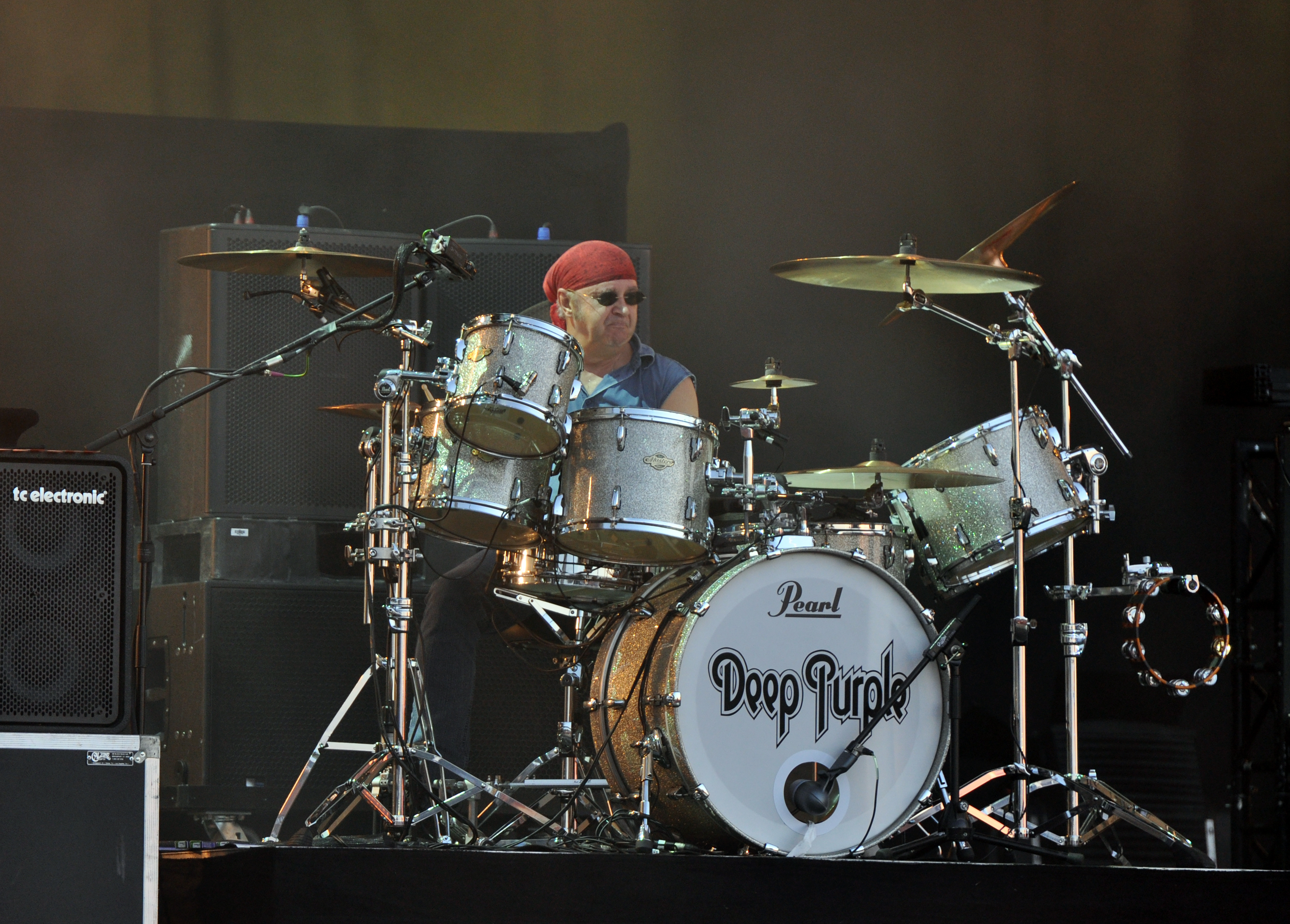 Deep Purple at Wacken Open Air 2013